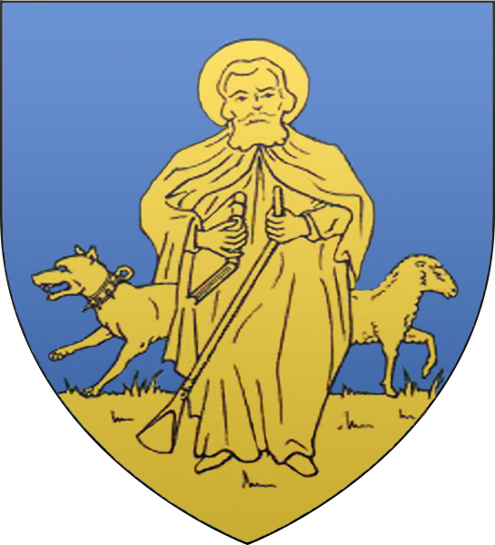 Blason de La Wantzenau